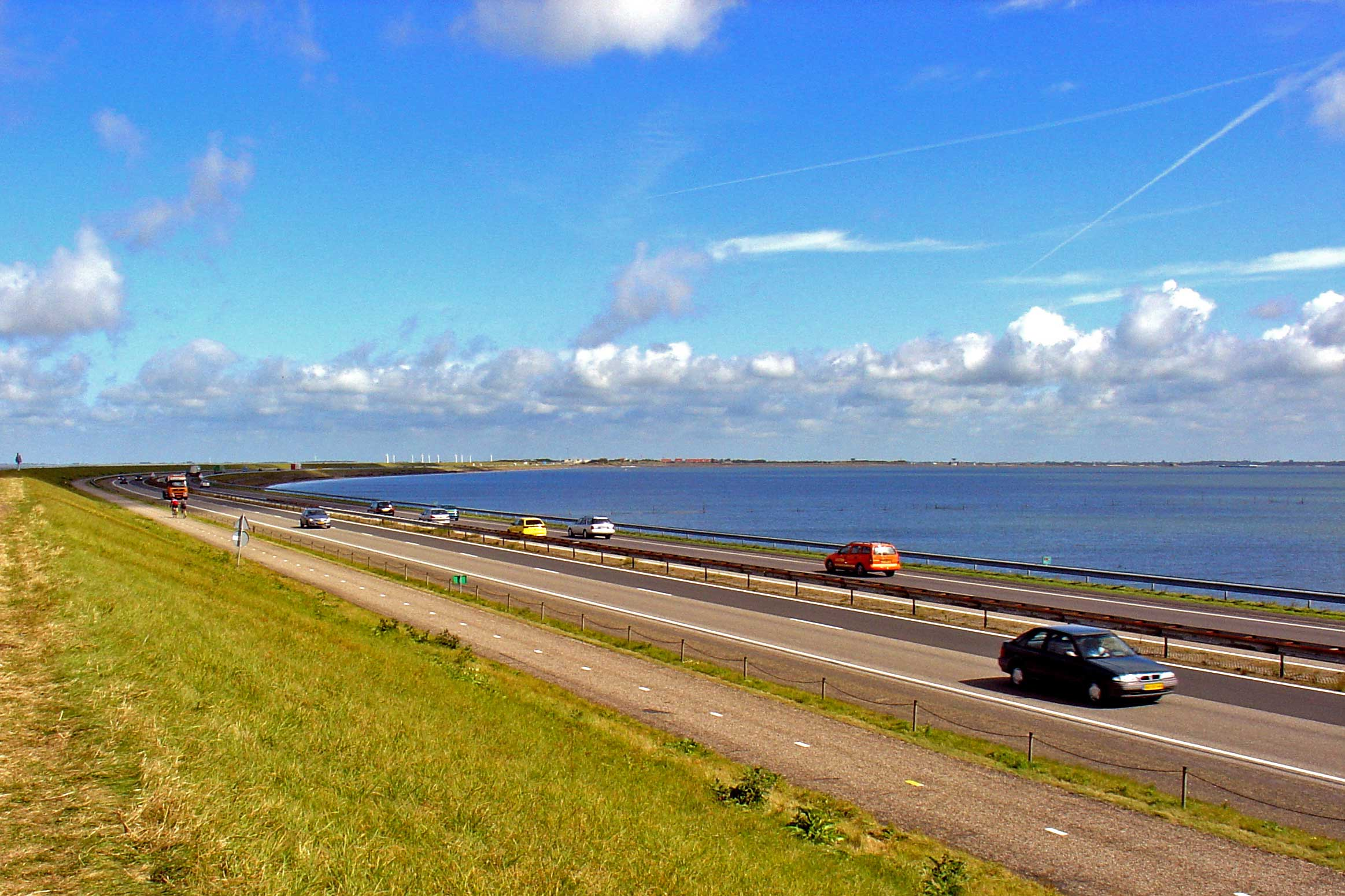 Knik in de Afsluitdijk nabij Kornwerderzand